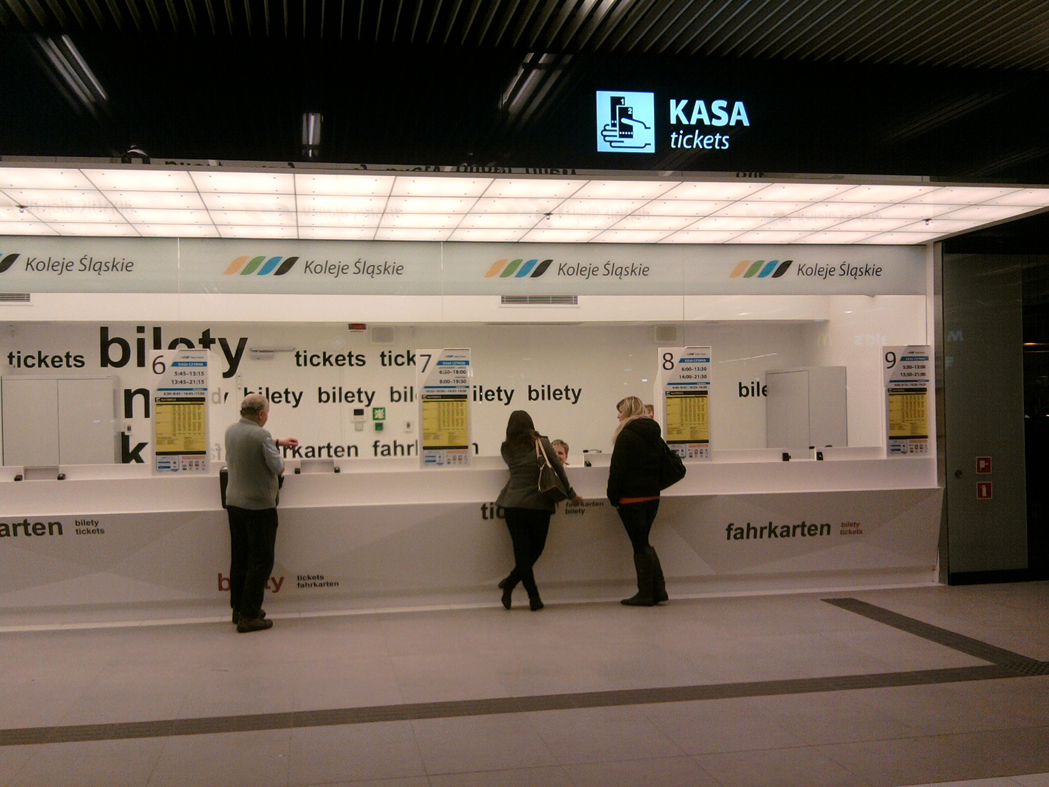 Kasy Kolei Śląskich na dworcu w Katowicach